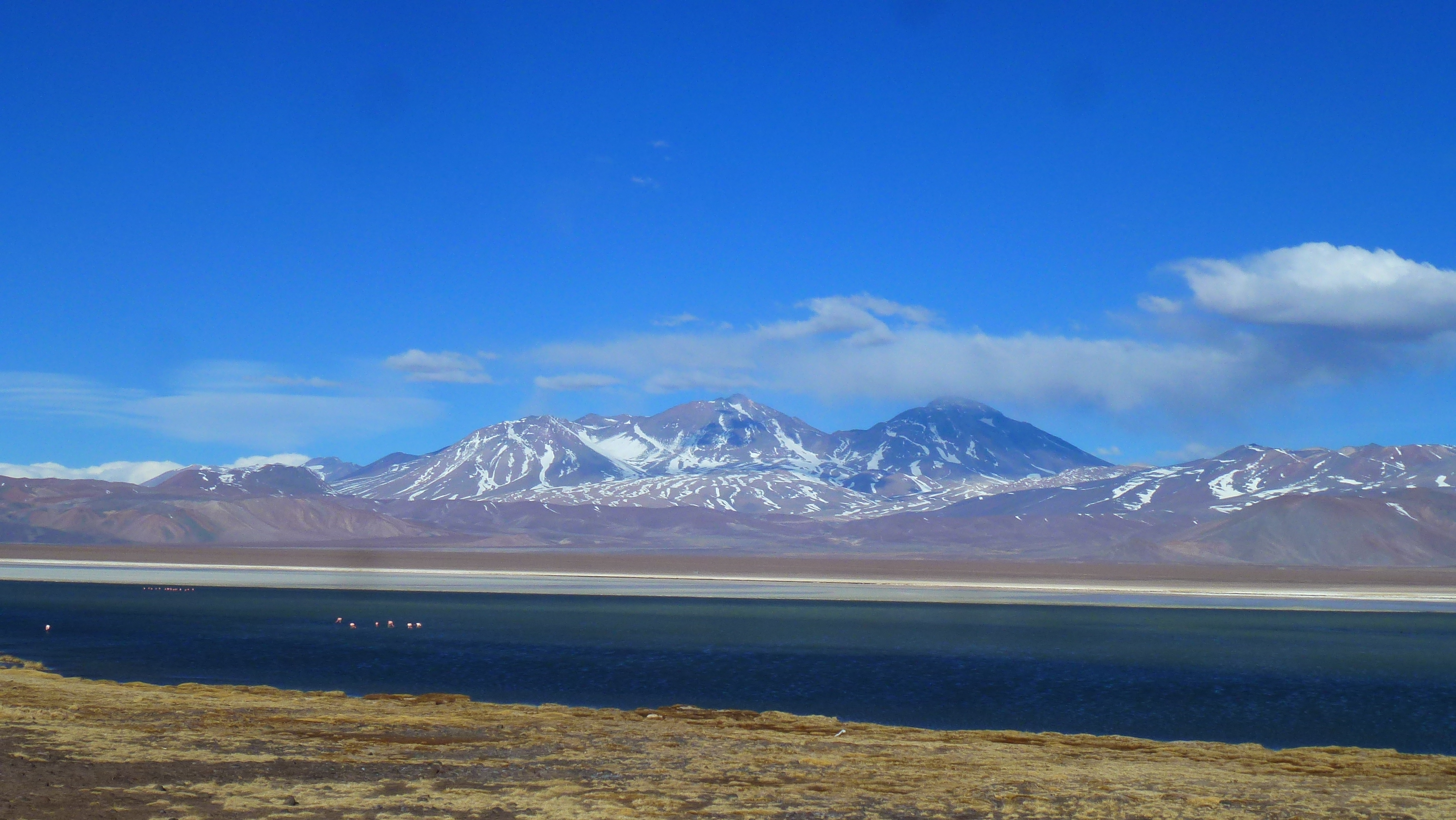 Panoramica de la laguna con las tres cimas de fondo del nevado tres cruces